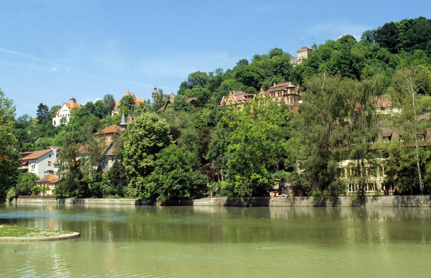 Mündung der Steinlach in den Neckar in Tübingens Innenstadt. Am Gegenhang mit Häusern der Studentenverbindungen und Jugendherberge. Das trübe Steinlachwasser setzt sich vom klaren Wasser des Neckars ab. Grund: Am Vortag war im Einzugsgebiet der Steinlach ein Gewitter mit Starkregen niedergegangen. Die Steinlach ist im Bild vorne links zu sehen. Eigene Fotografie im Juli 1986.